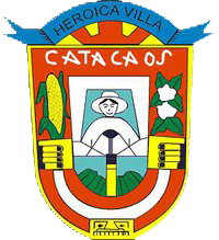 Escudo de Catacaos